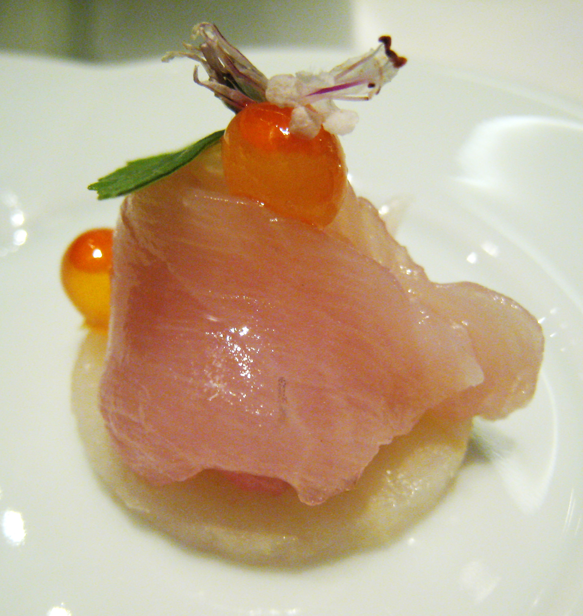 Hamachi, salmon egg, basil, basil flower.